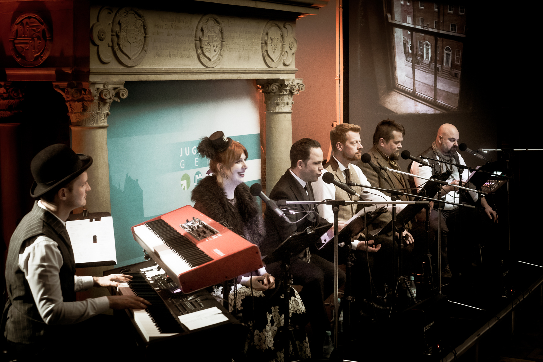 Das Theater ex libris bringt Literatur-Klassiker als Live-Hörspiel auf die Bühne. Das Ensemble liest aus und agiert zu Bearbeitungen der Original-Texte. Die Vorstellungen werden dabei von einem Improvisationsmusiker und einer dramaturgisch abgestimmten Dia-Show ergänzt.